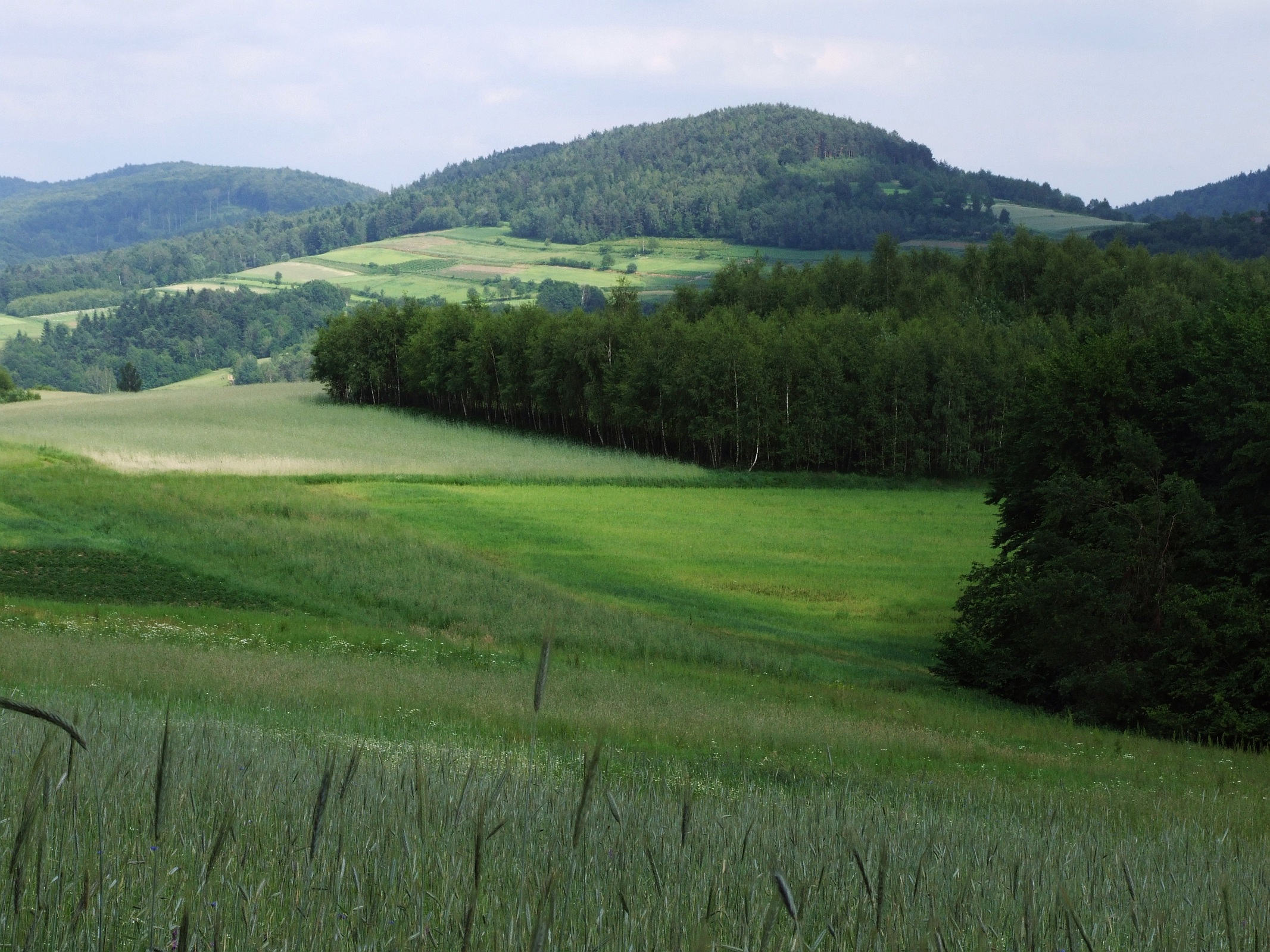 Dominiczna Góra. Widok z Paprotnej. Po lewej i po prawej stronie Dominicznej Góry Pasmo Szpilówki